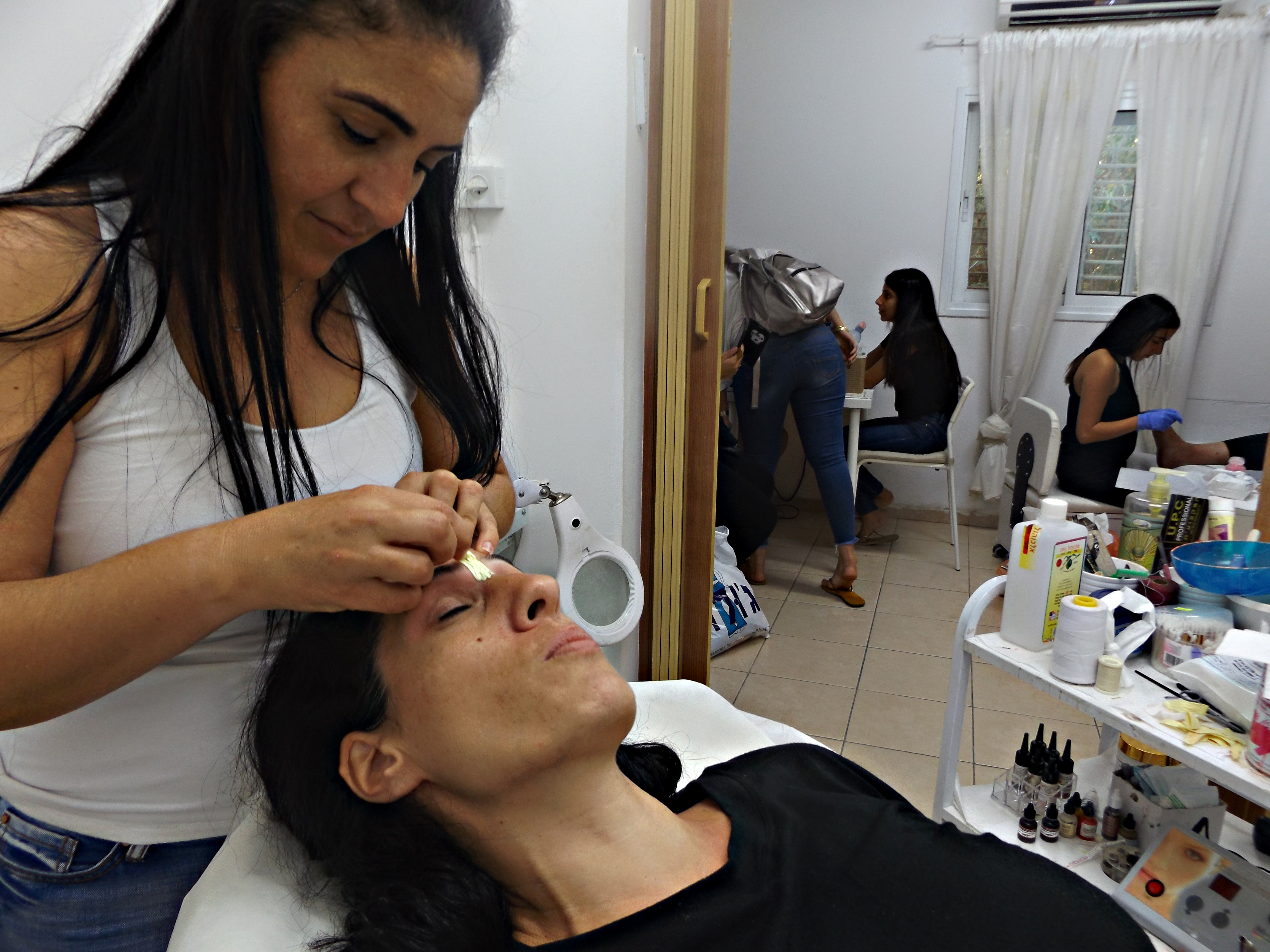 קוסמטיקה , רוטברג לירז כהן